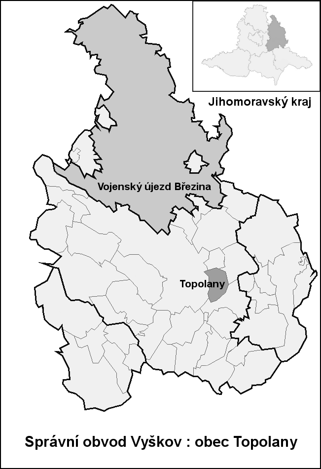 Hranice Topolany (Vyškov- czech republic)